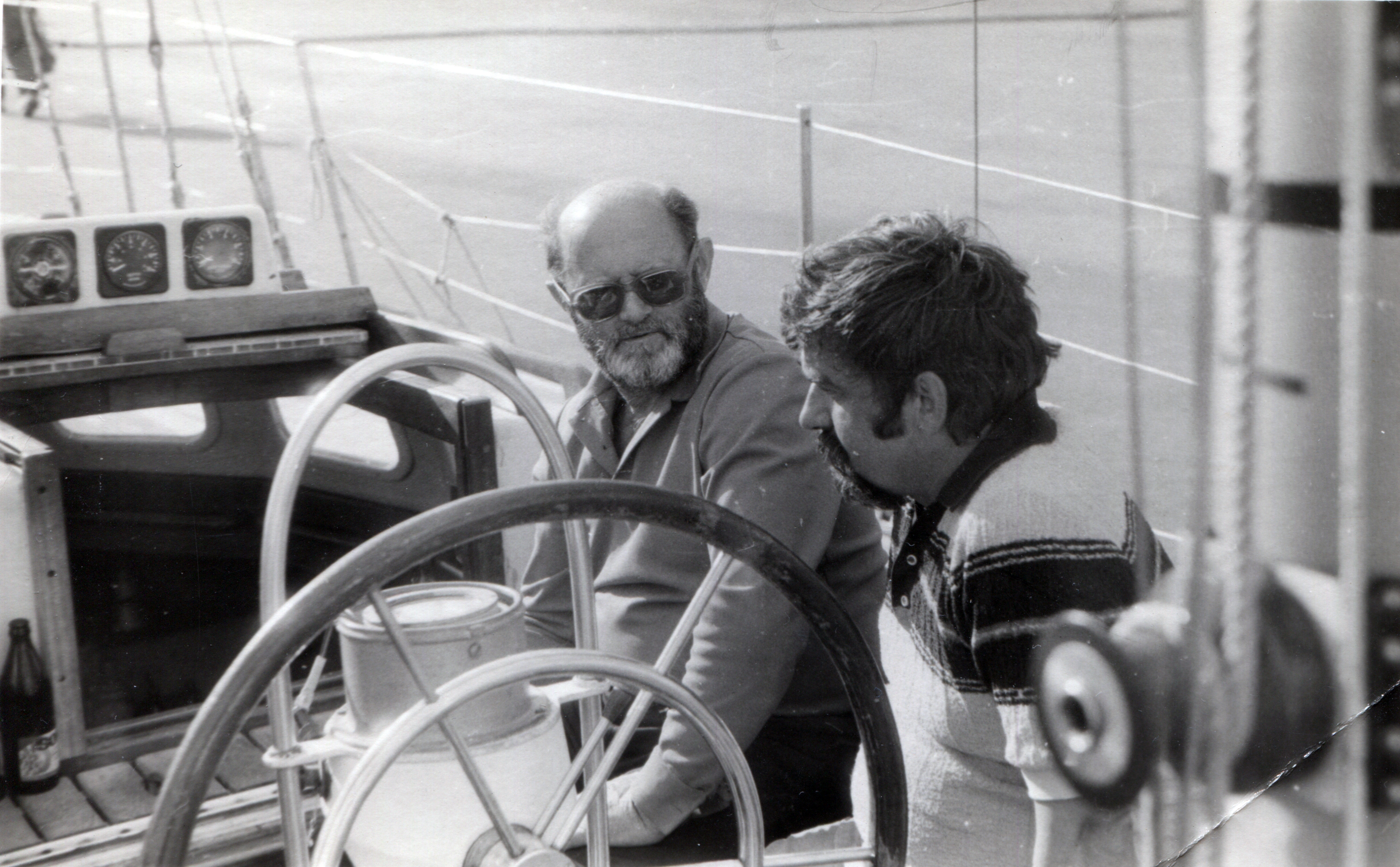 Henryk Jaskóła i Jerzy Kordecki na Darze Przemyśla